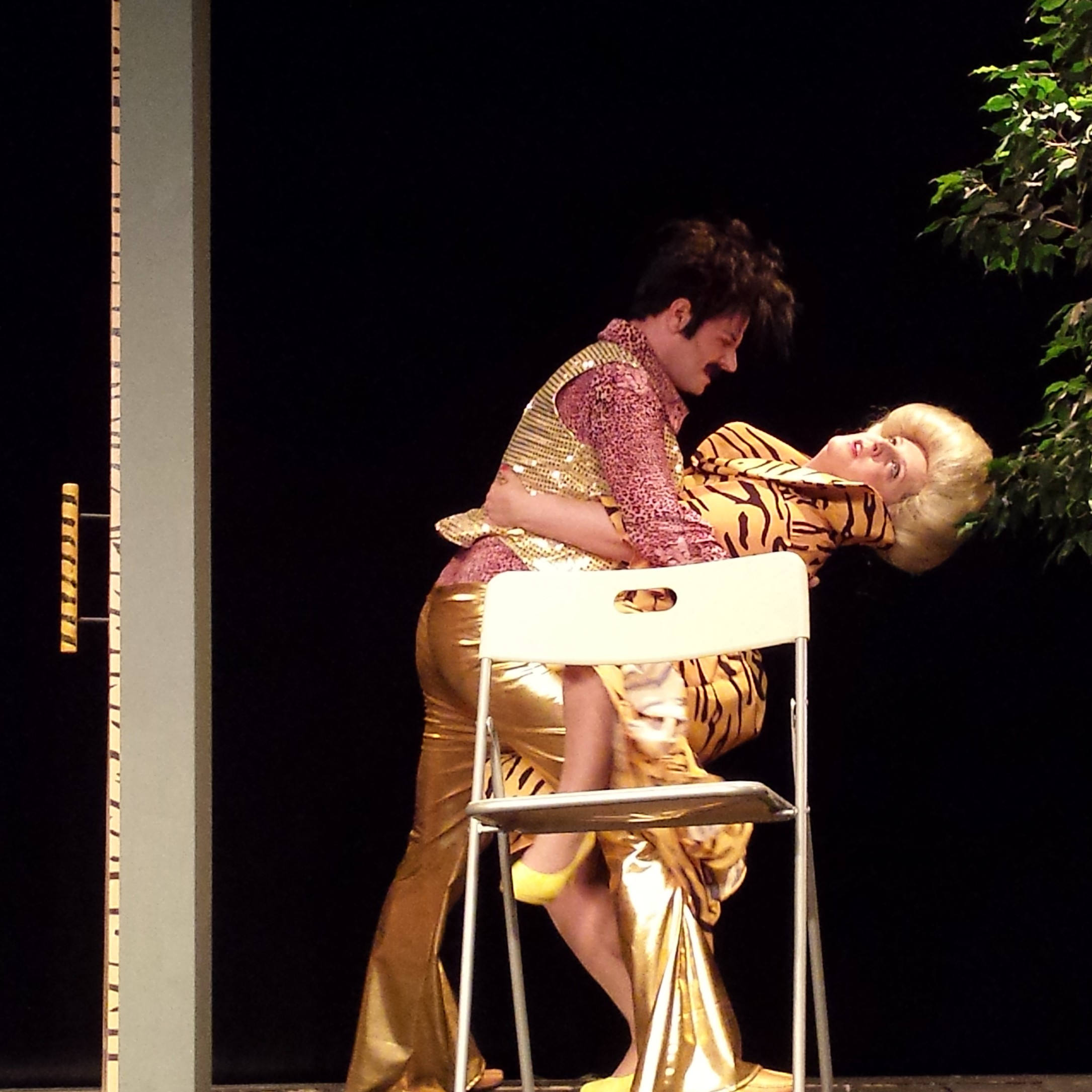 הפקת "האישה המופלאה שבתוכנו", 2015